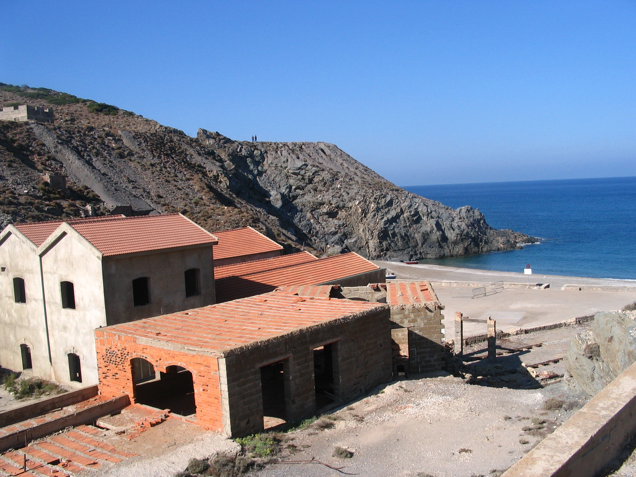 Argentiera plage in Sardinia, region Nurra